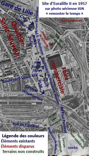 Site d'Euralille II en 1957